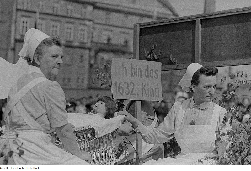 Original image description from the Deutsche Fotothek Zwei Krankenschwestern (Hebammen) auf einem Demonstrationswagen